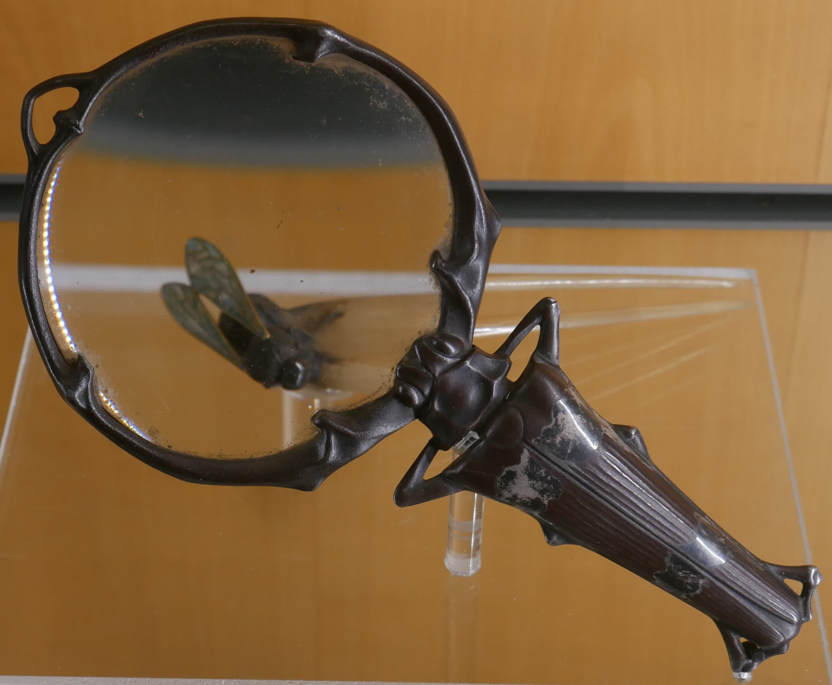 Bronze fondu patiné brun noir, partiellement argenté, verre Achat auprès de l'artiste 1907